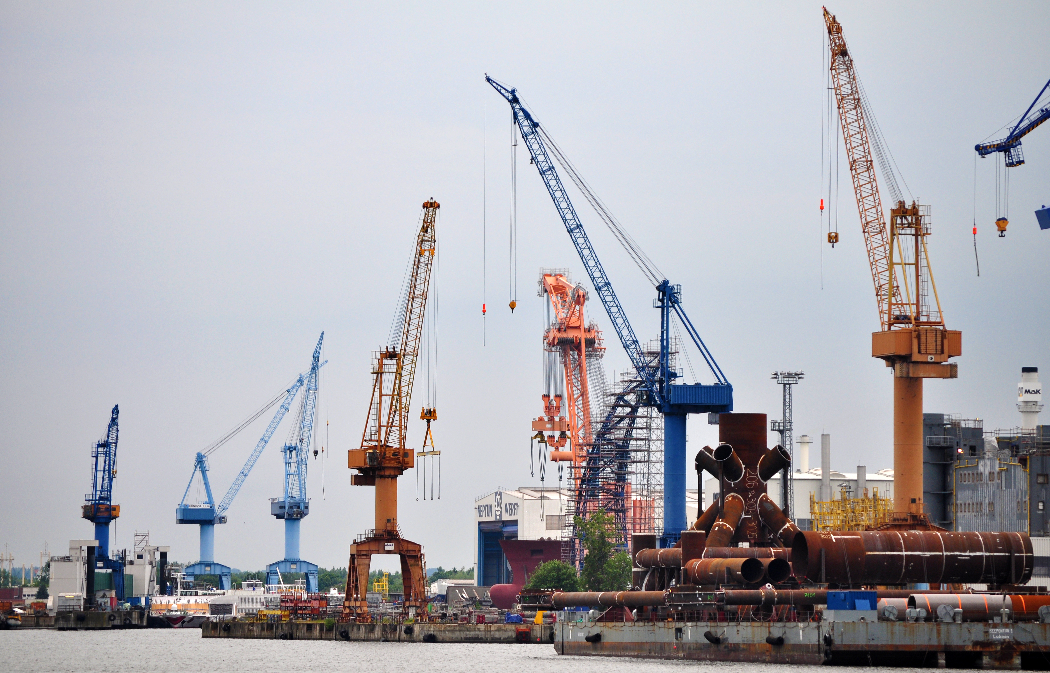 pontoon crane "Langer Heinrich" at shipyard Warnemünde, 2012_2